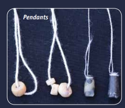 Индская цивилизация